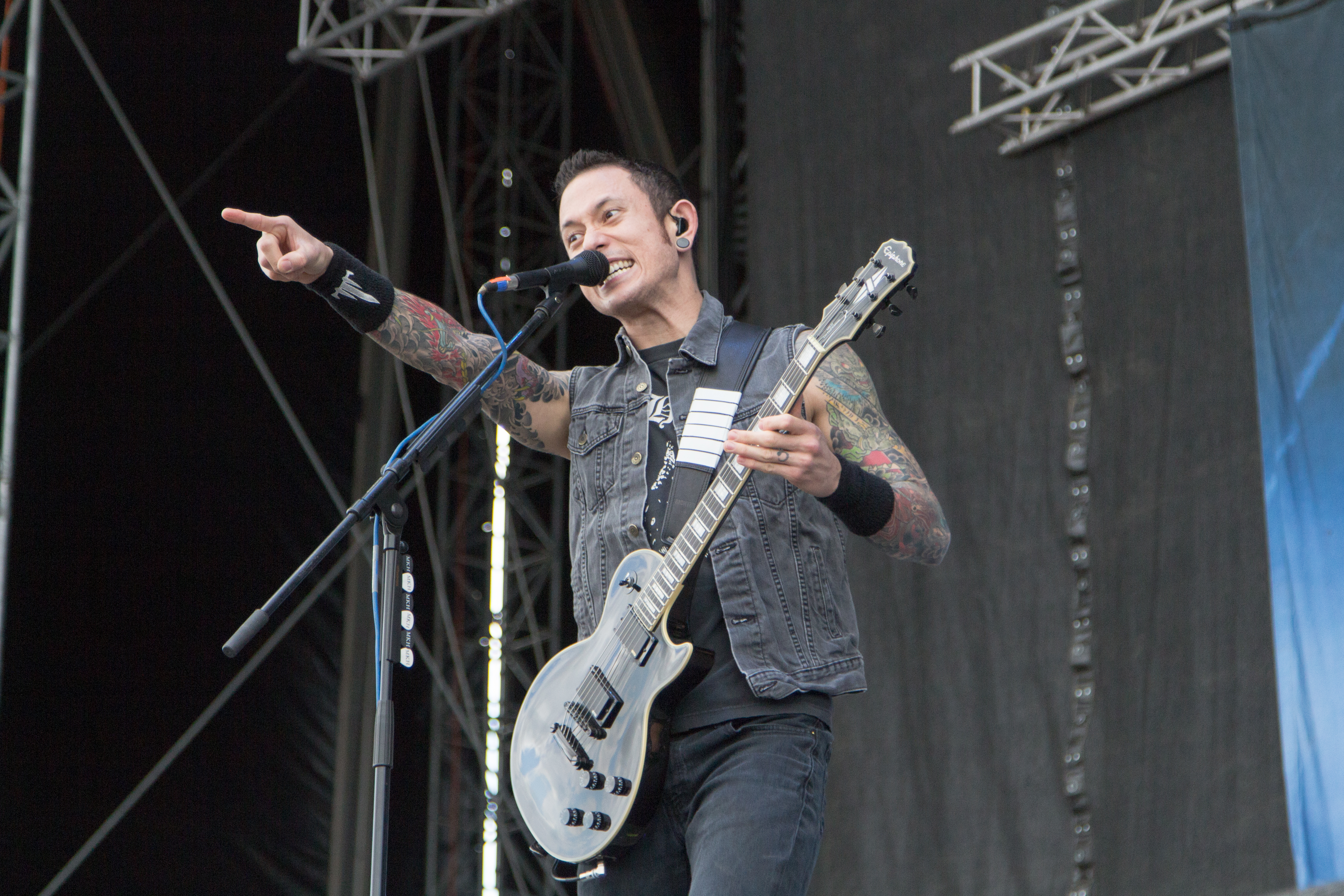 Matt Heafy from Trivium at Nova Rock 2014